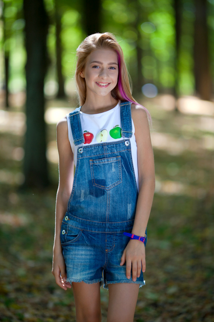 Зина Куприянович